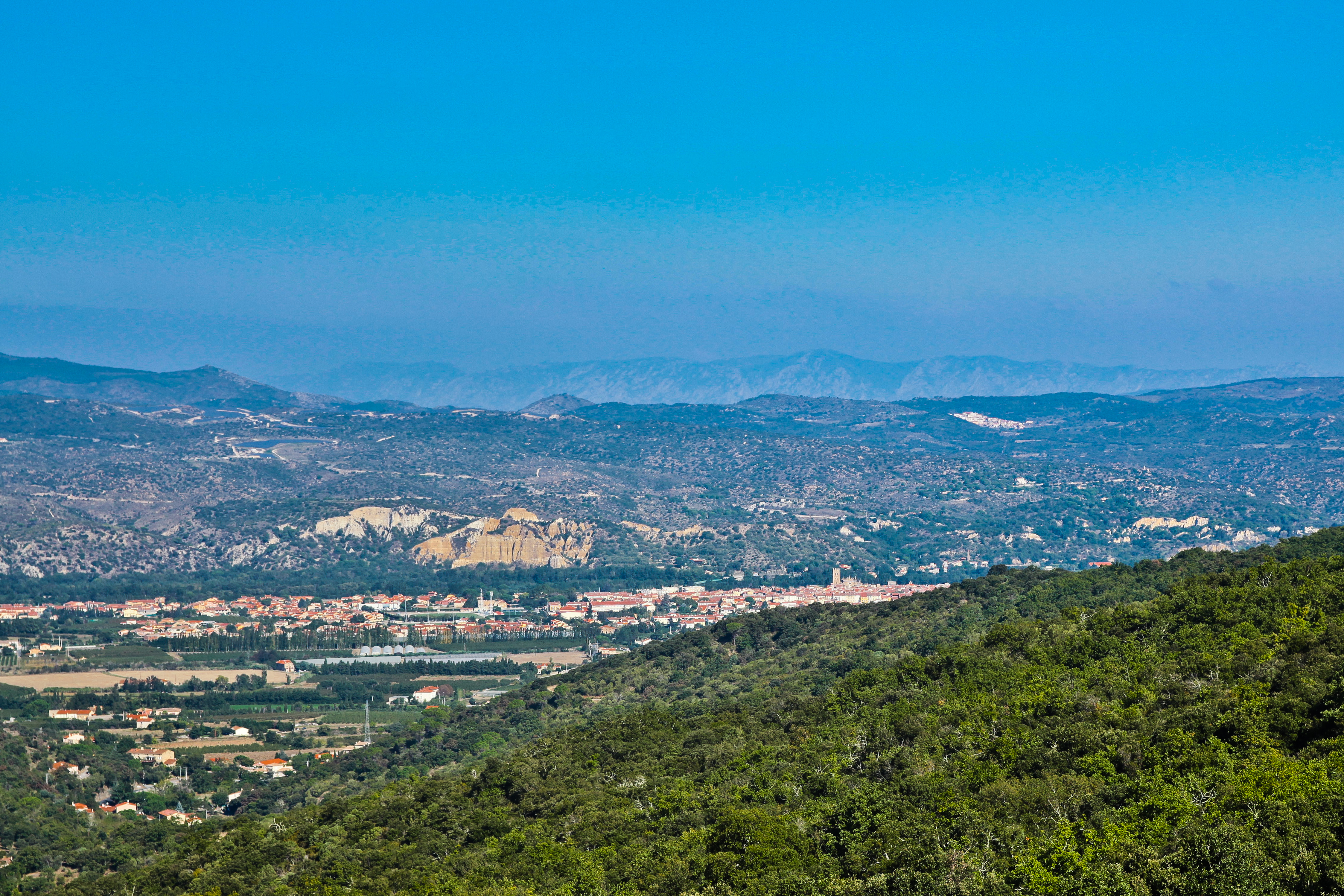 Vue sur Ille-sur-Têt depuis Saint-Michel-de-Llotes